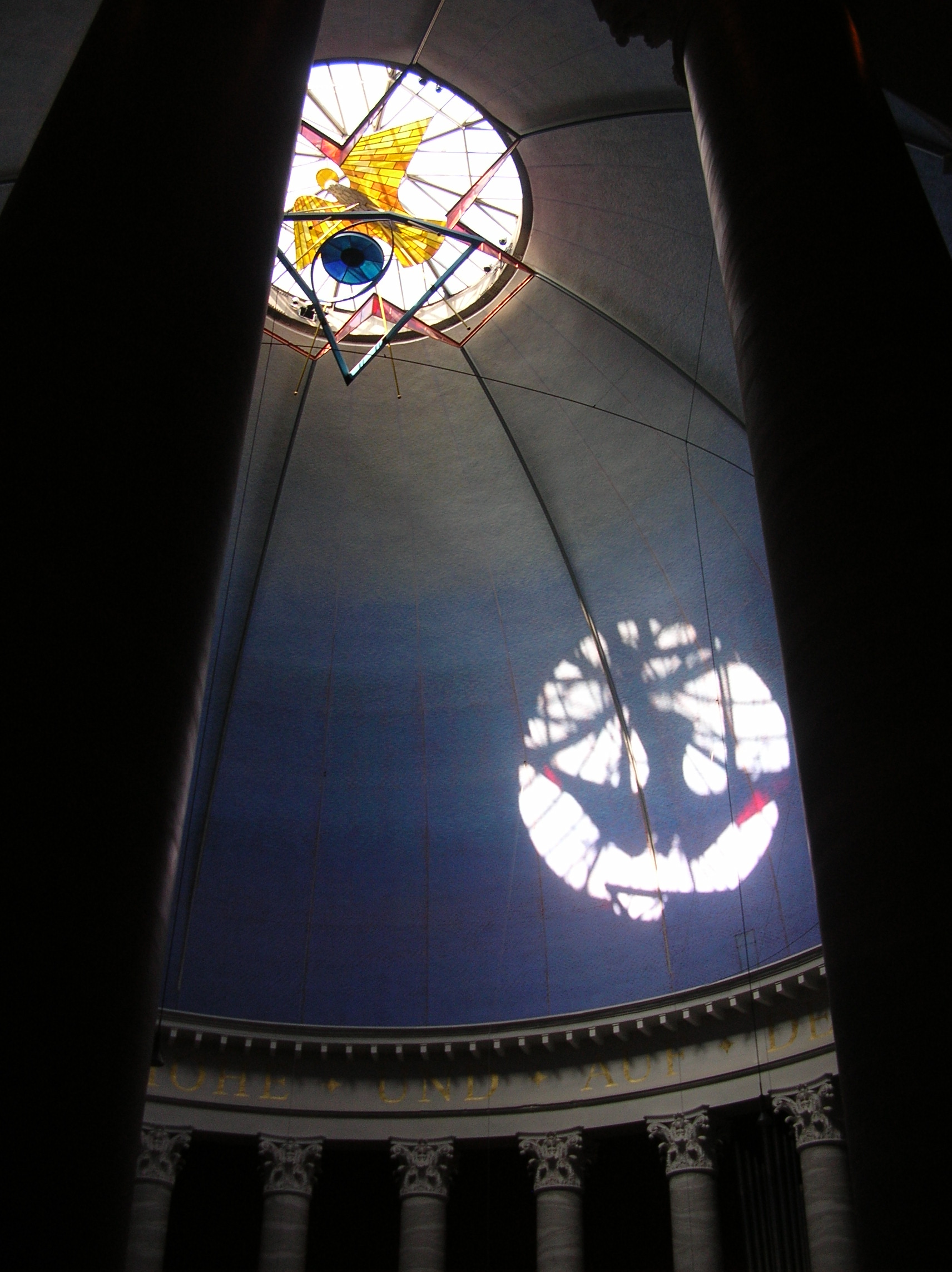 Darmstadt, kath. Kirche St. Ludwig, Blick zum Kuppelscheitel